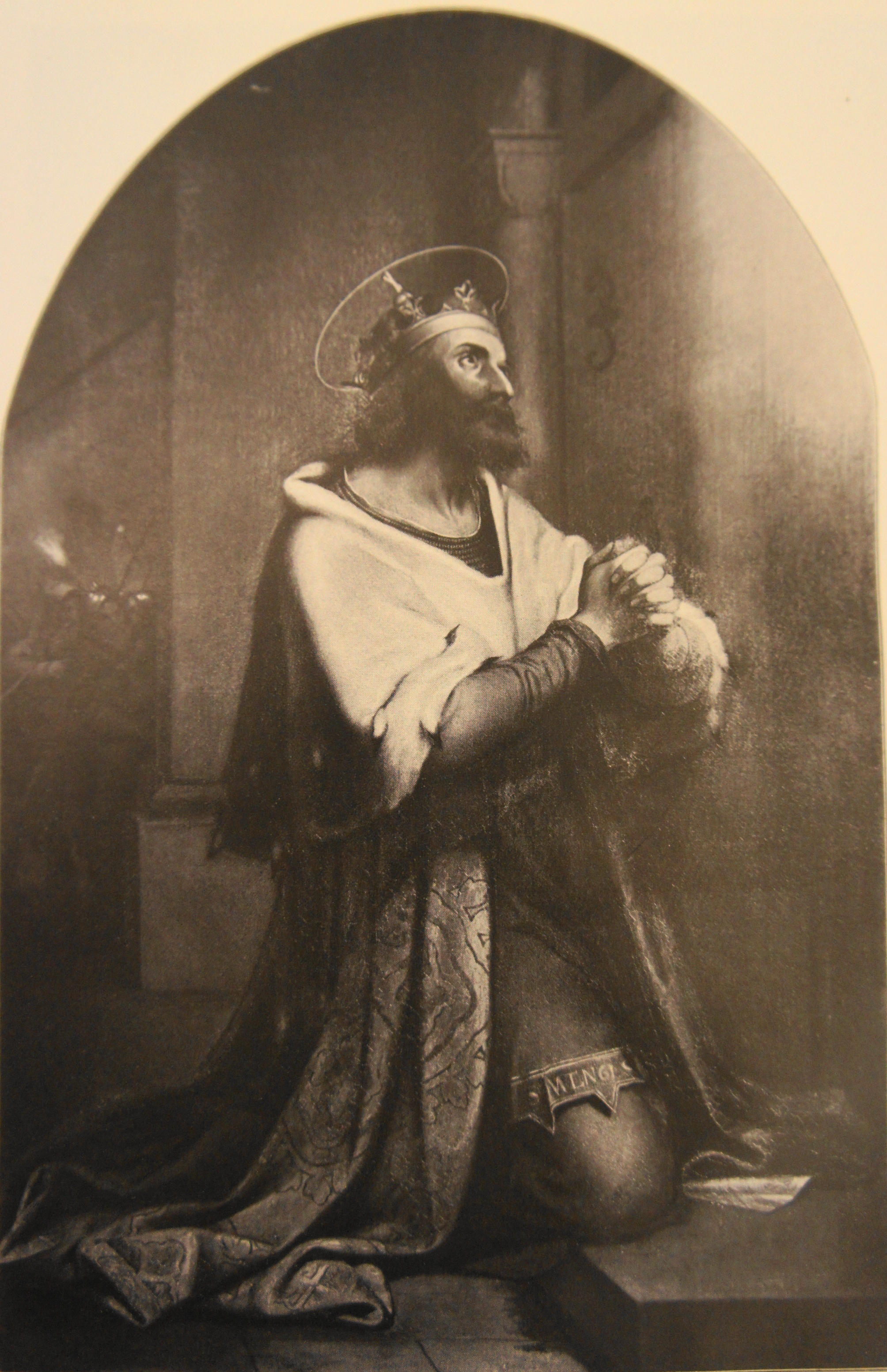 Der heilige Wenzeslaus. In: Hans Geller: Ein Jünger der "göttlichen Kunst". Das Lebensbild des Nazareners Adolf Zimmermann. In: Neues Lausitzisches Magazin, Band 110 (1934), S. 171-229 und Anhang. Altarbild in der katholischen Kirche zum heiligen Kreuz in Görlitz